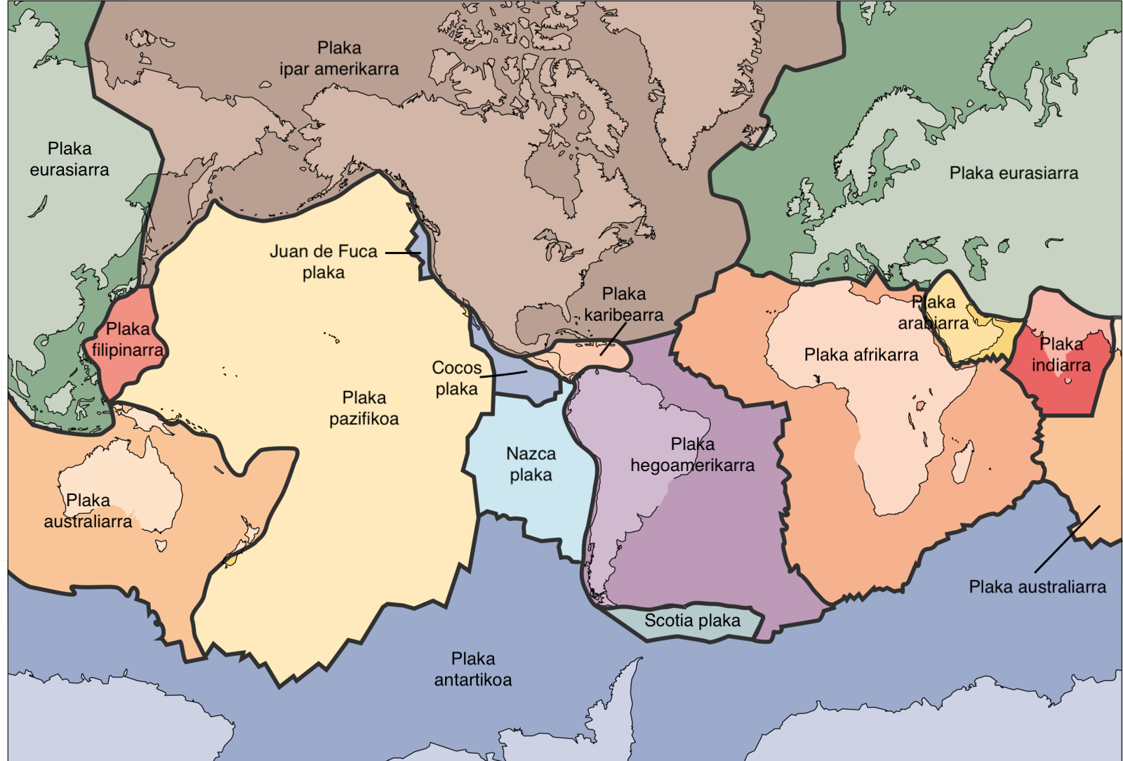 Plaka tektonikoen banaketa